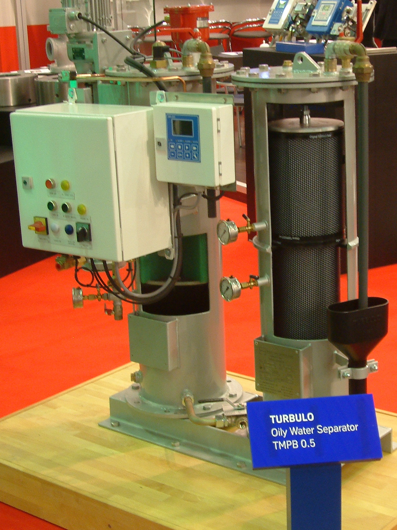 Europort 2009